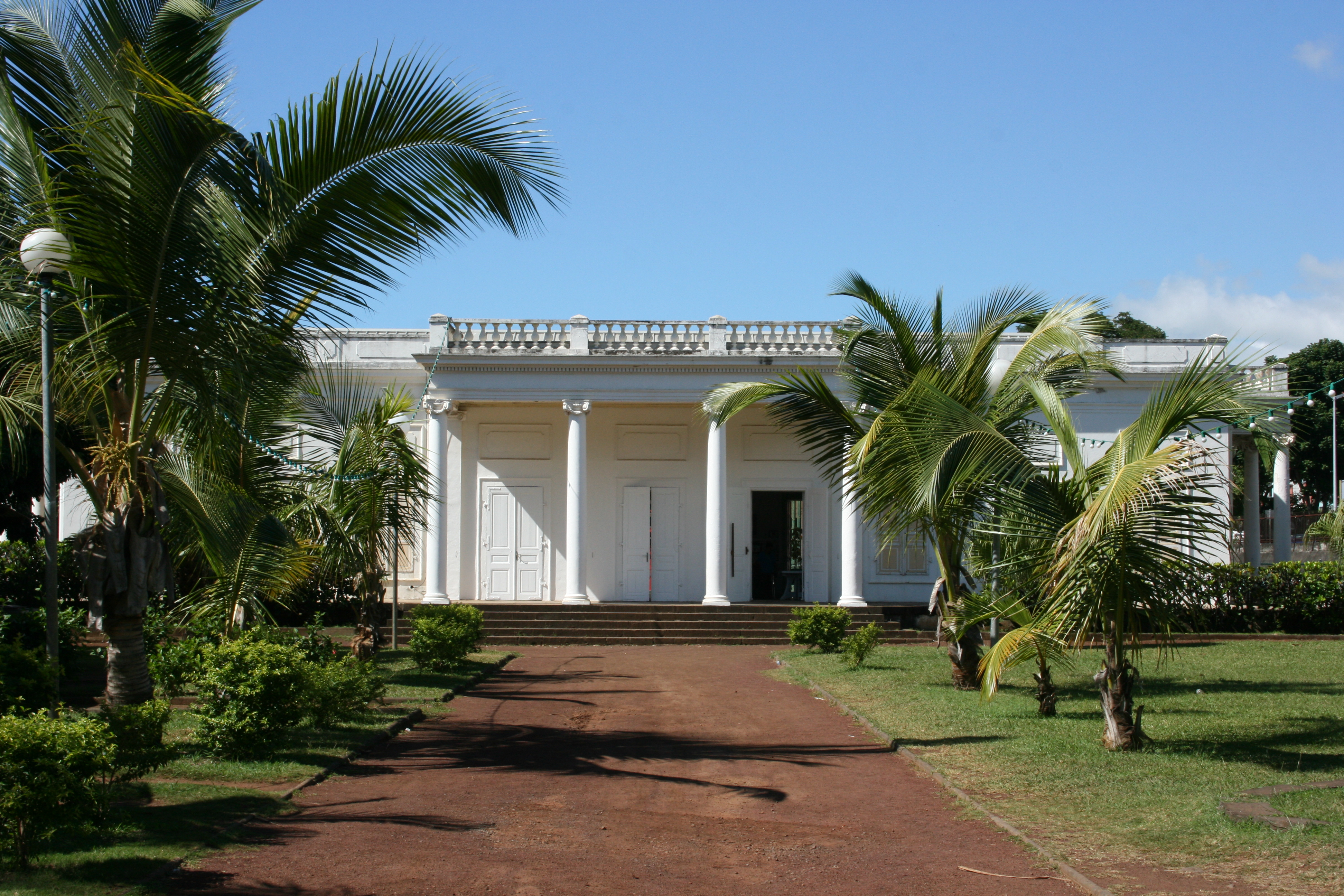 Façade du château Morange à Saint-Denis de La Réunion.